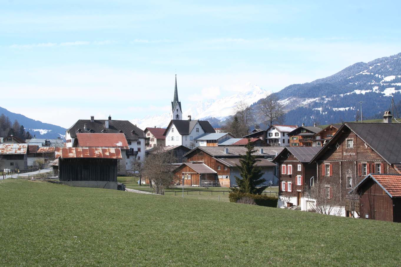 Valendas